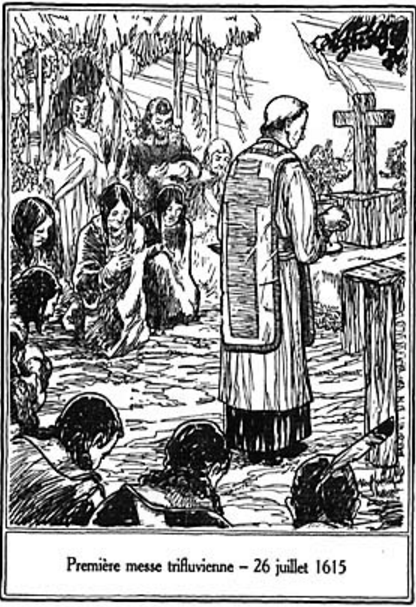 Première messe trifluvienne